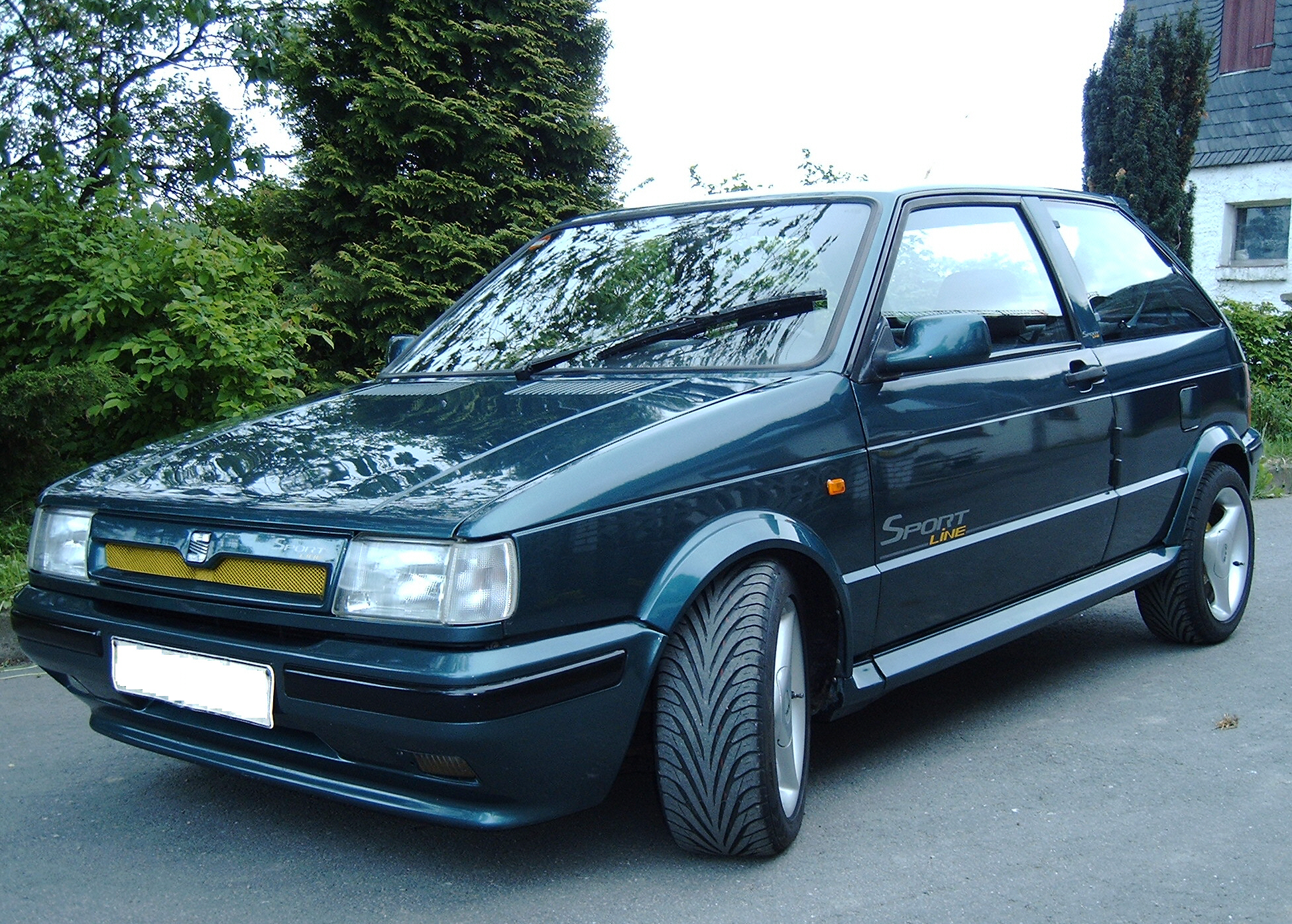 Seat Ibiza Sportline 1,7i.